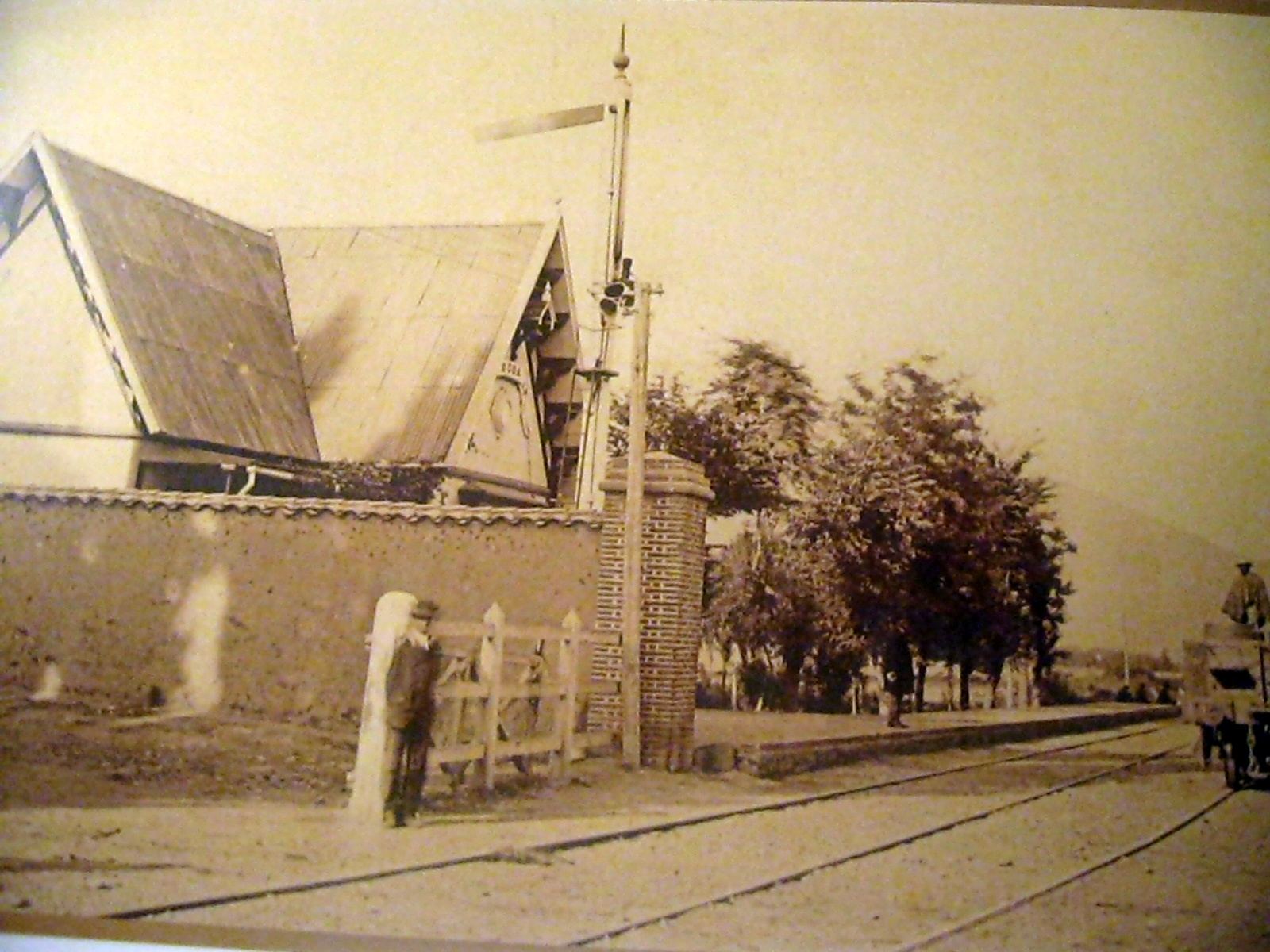 Estacion de Ferrocarril de Ocoa en 1863